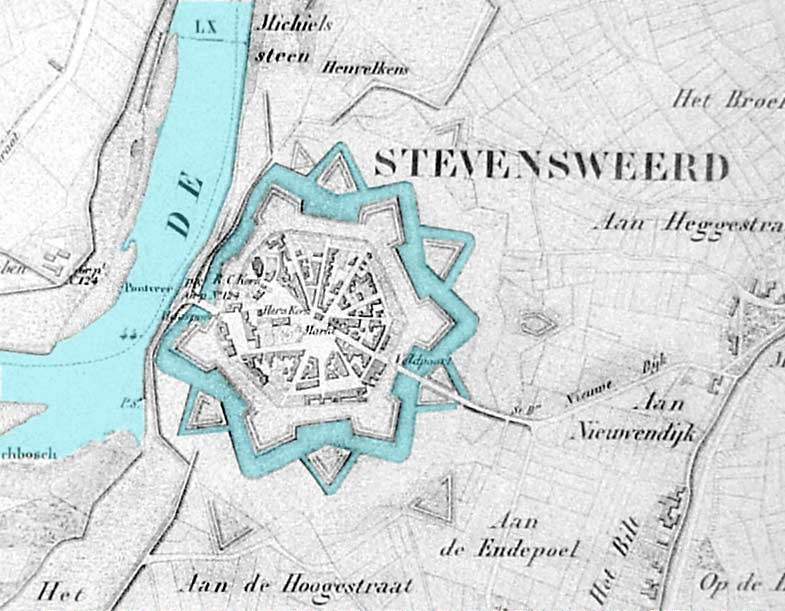 Rivierenkaart Stevensweert ca 1850. Bron: Bibliotheek Koninklijke Militaire Academie te Breda. Foto-archief en digitale bewerking Ed Stevenhagen.